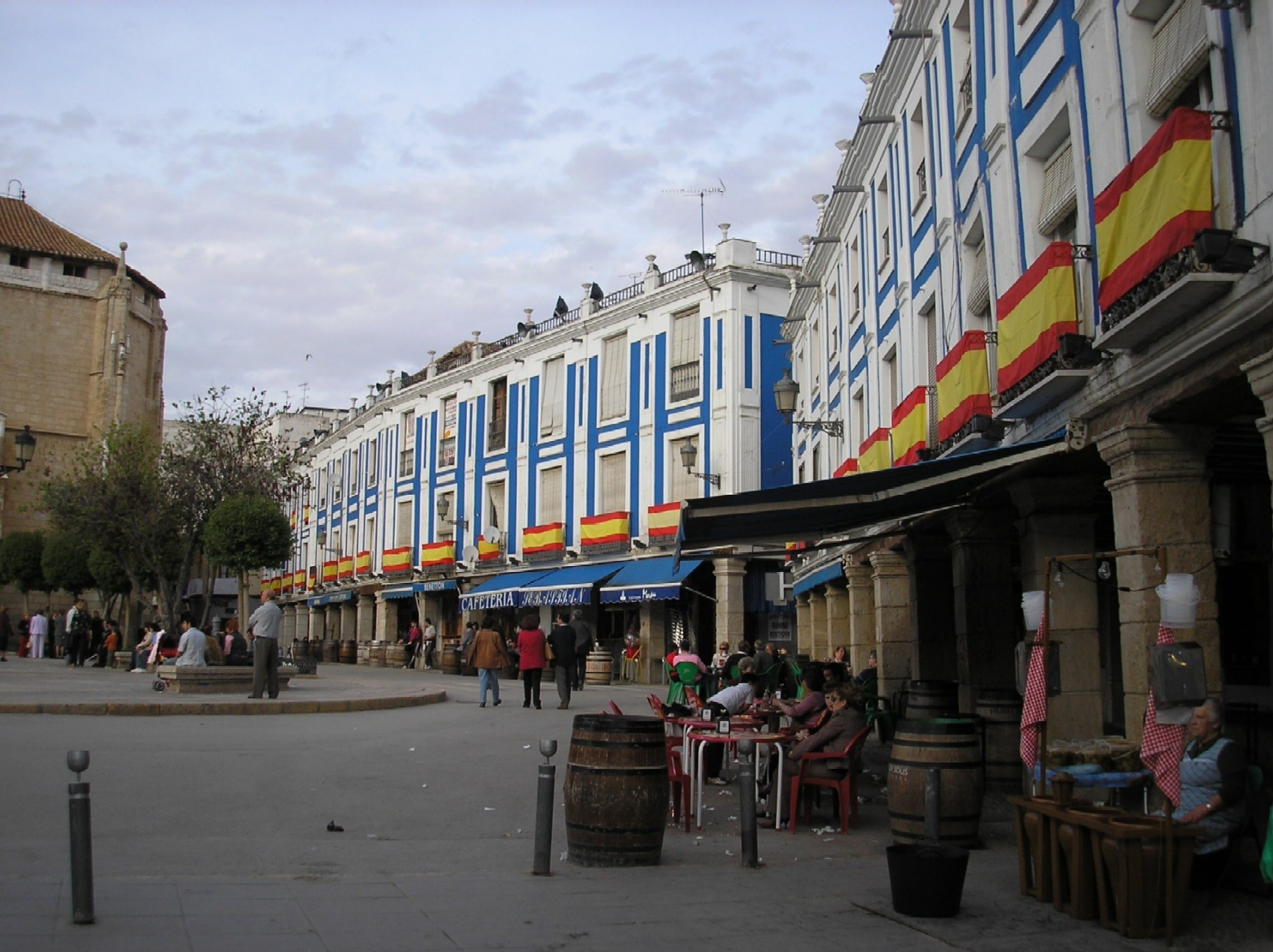 taken by Valdoria.